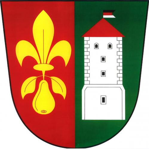 znak, Hrušov, okres Mladá Boleslav